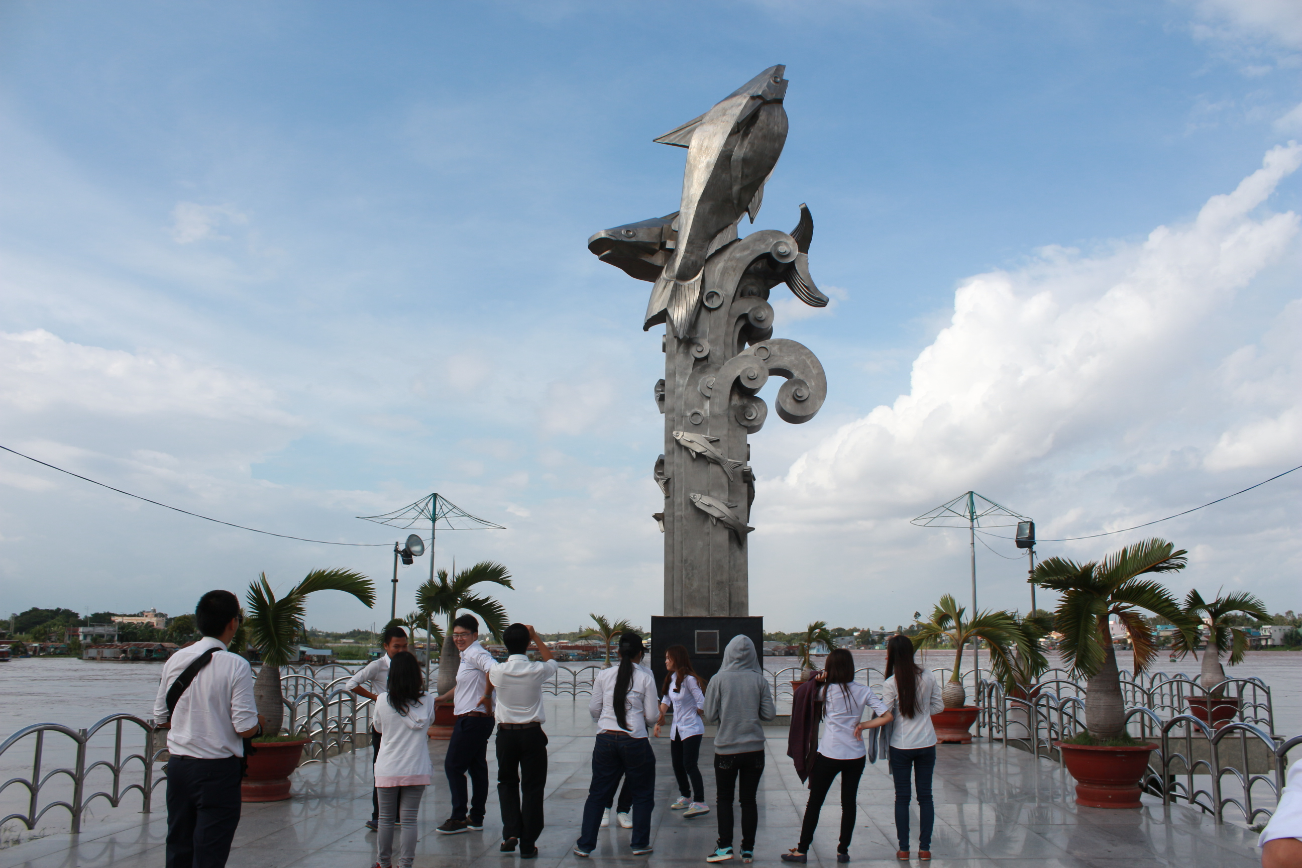 Tượng đài cá ba sa